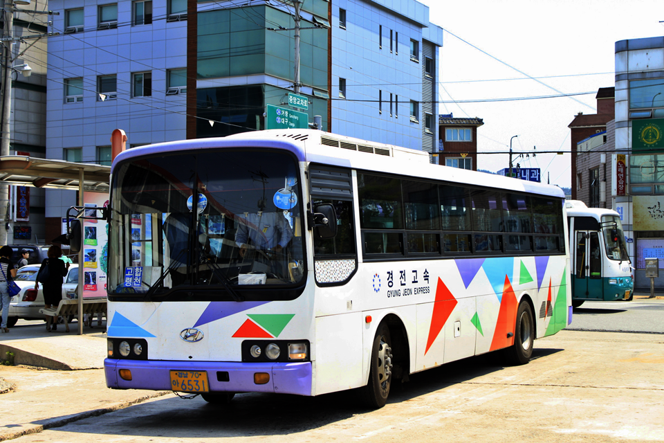 합천시외버스터미널에 정차한 경전고속 현대 에어로시티